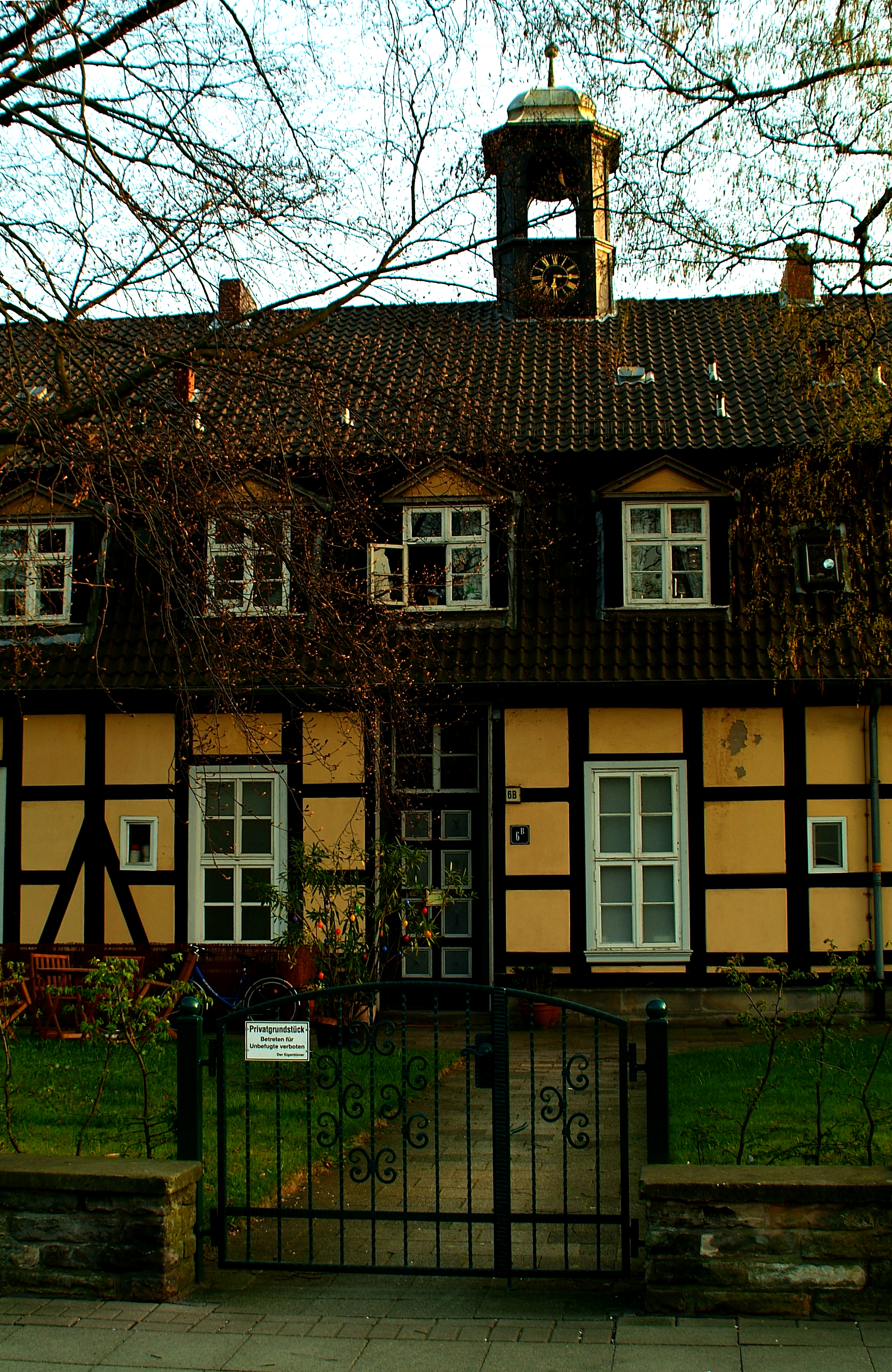 Sie haben ein besses Bild? Sogar ein historisches? Zeigen Sie' s uns. Allen Menschen.